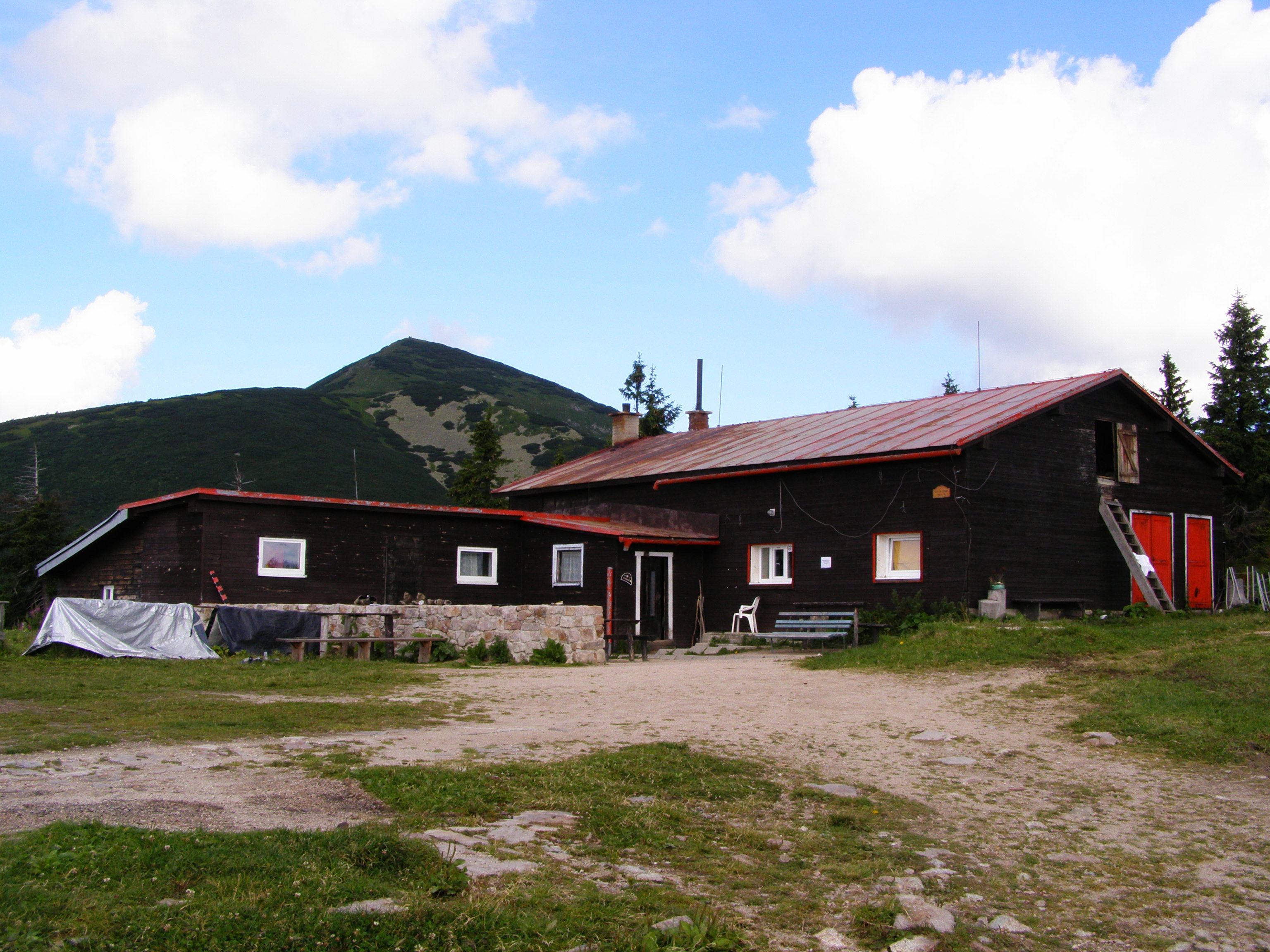 Krivánská Malá Fatra, Chata pod Chlebom, v pozadí Velký Kriváň